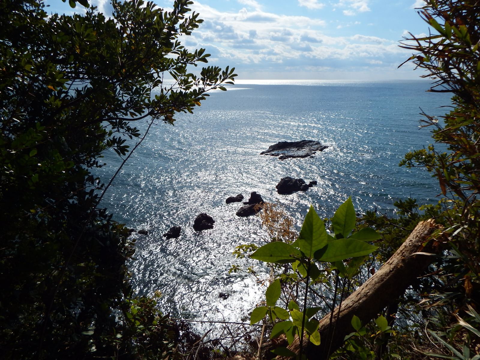 太平洋を極楽寺の境内より